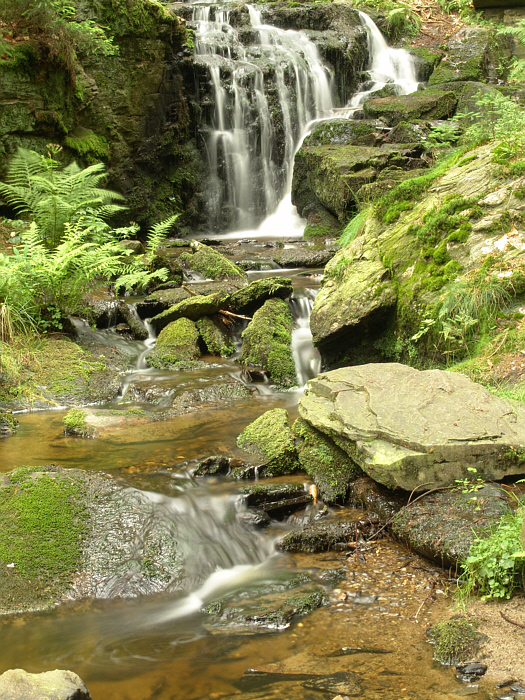 Muglbachwasserfall nahe der Muglmühle (2005)